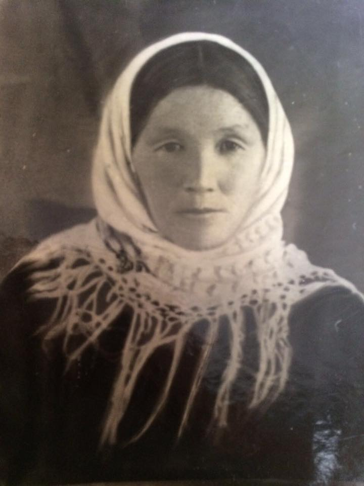 Мать Какши Рыскуловой